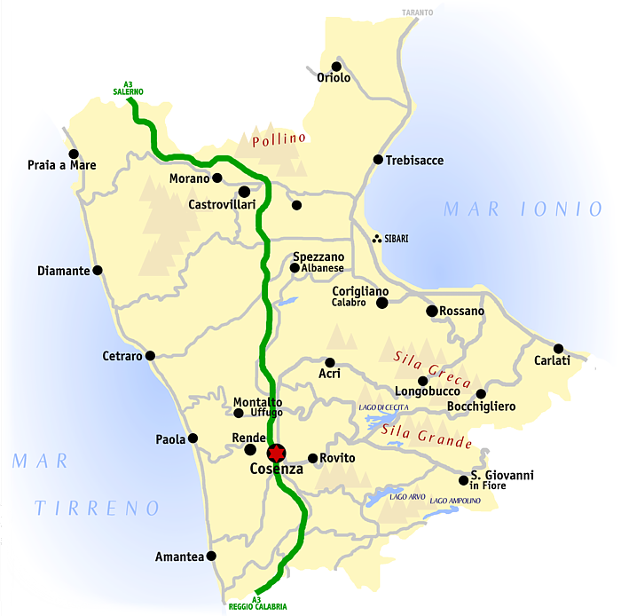 Kaart van de provincie Cosenza